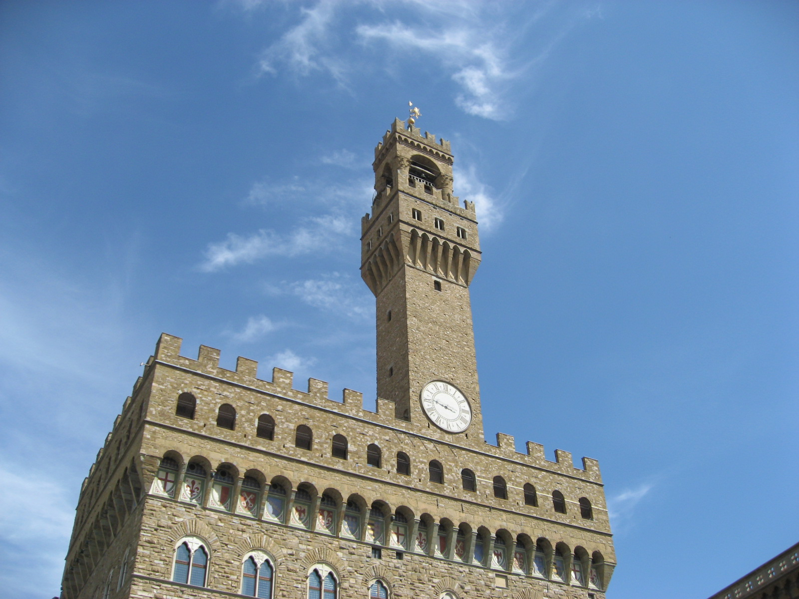 Palazzo Vecchio in Firenze